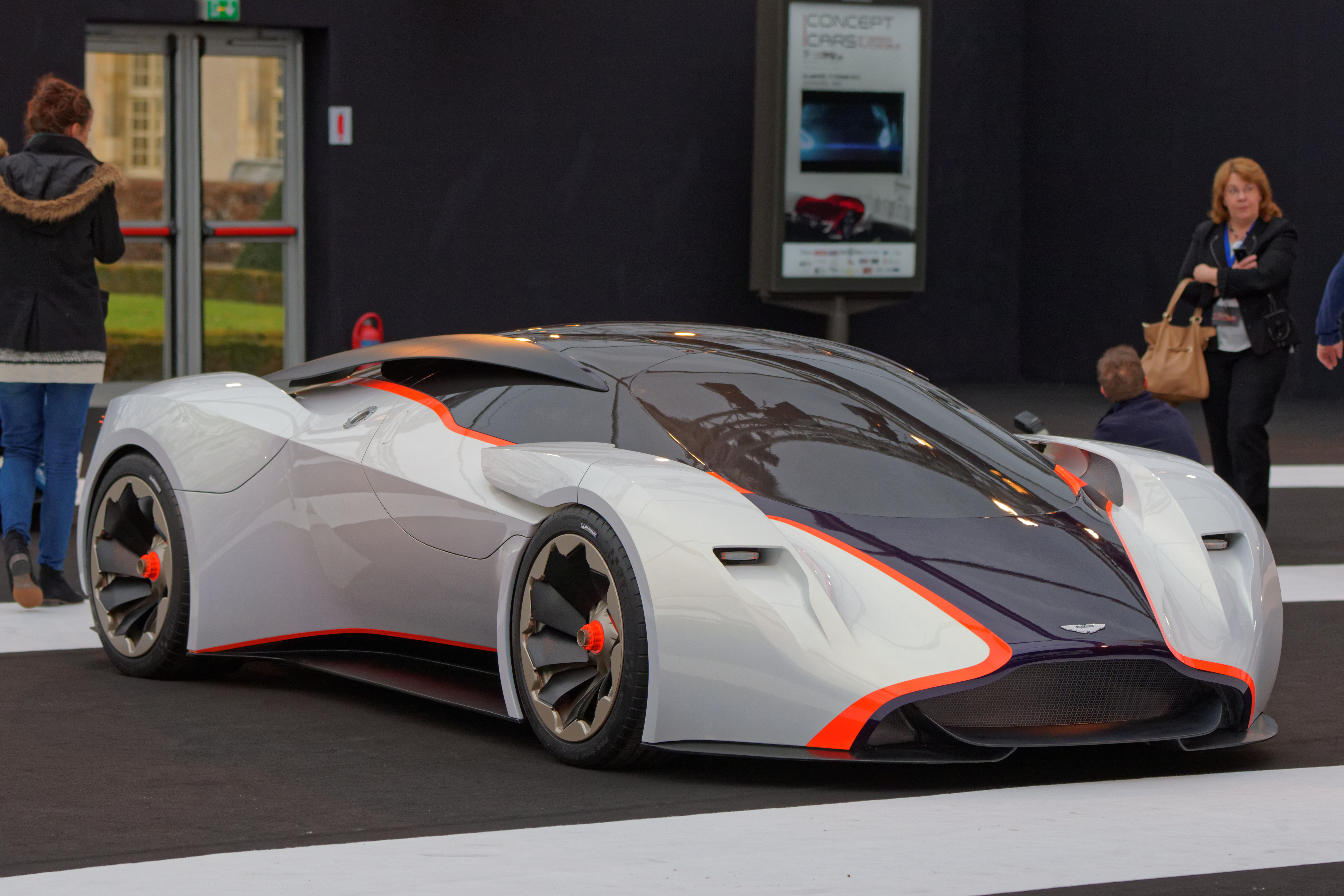 L'Aston Martin DP 100 Vision Gran Turismo exposée lors du festival automobile international 2015.